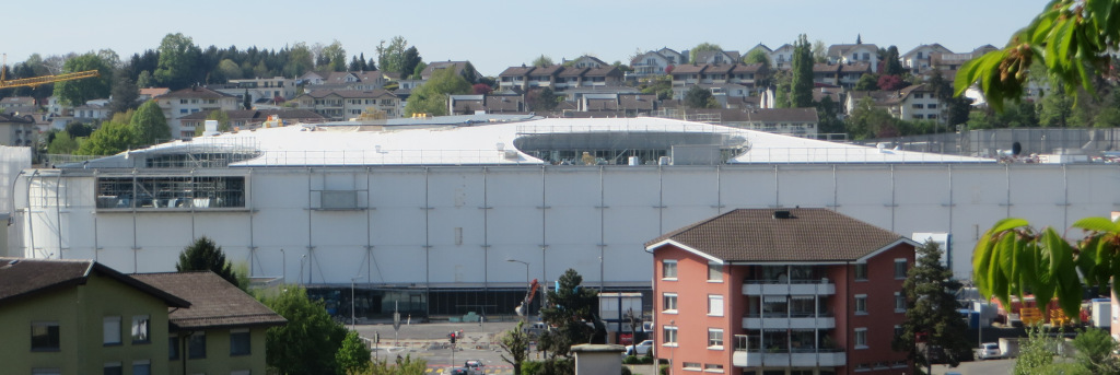 Das Einkaufszentrum Mall of Switzerland im Bau.